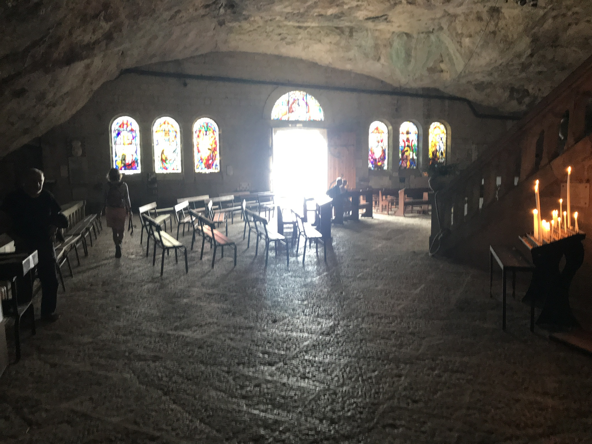 Binnenzijde grot in de bergketen ‘Massif-de-la-St.-Baume waar Maria Magdalena volgens de overlevering 30 jaar verbleven heeft na haar aankomst in Frankrijk